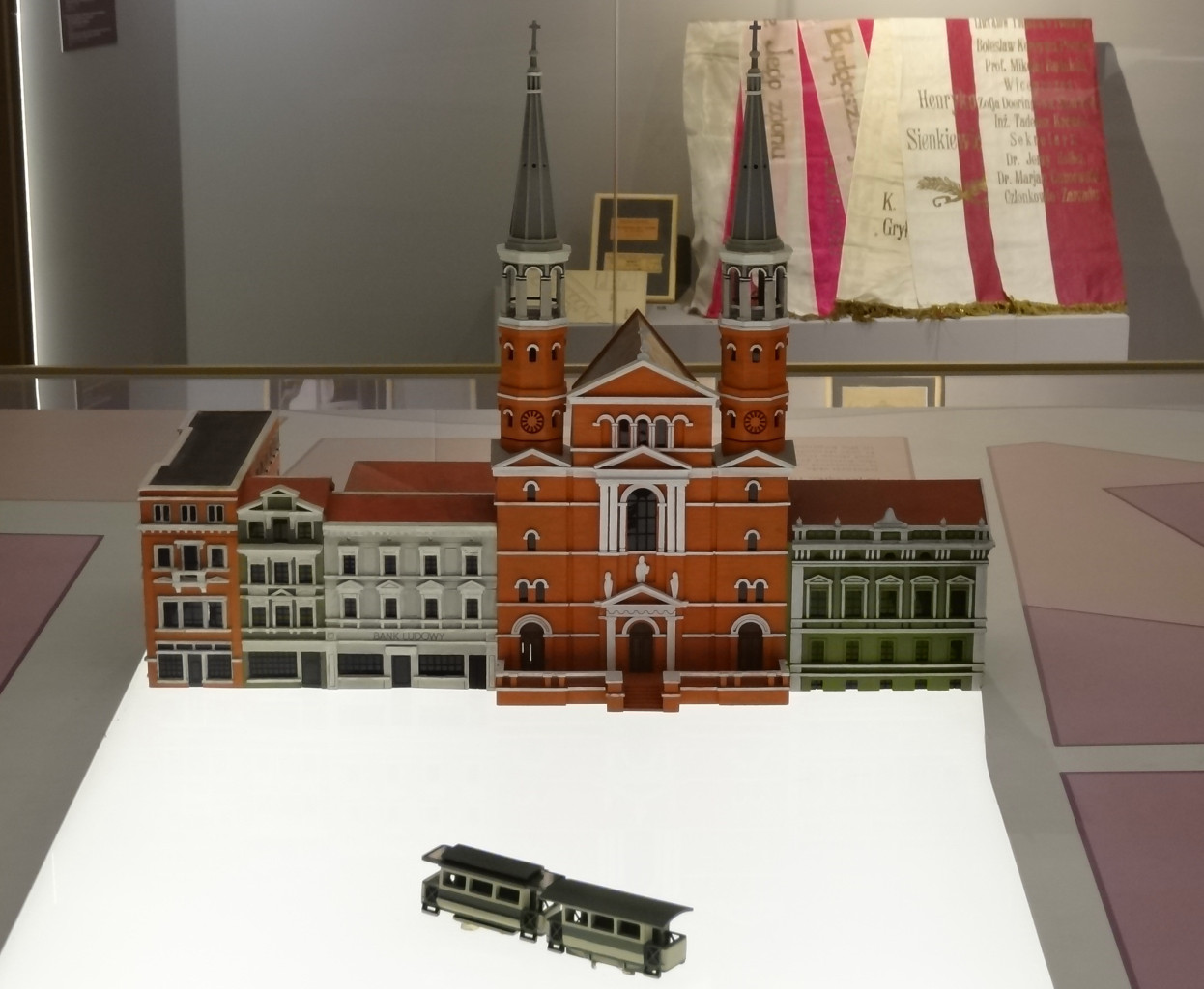 Model zachodniej pierzei Starego Rynku w Bydgoszczy z kościołem jezuickim na wystawie w Muzeum Okręgowym im. Leona Wyczółkowskiego w Bydgoszczy w spichrzach przy ul. Grodzkiej